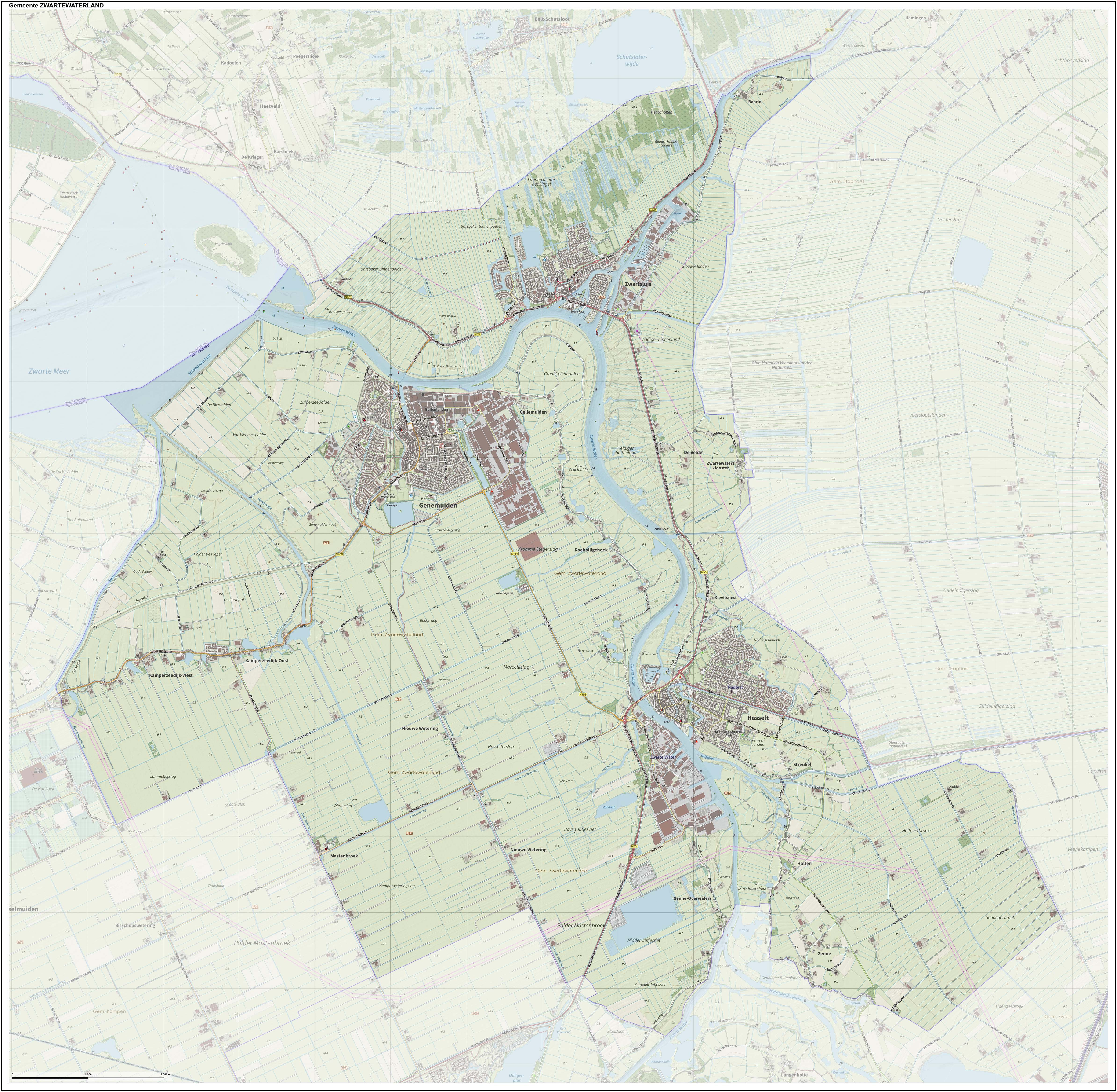 Topografische gemeentekaart. Resolutie: 400 pixels/km. Kaartbeeld samengesteld uit de open geodata van de Top10NL en Top25namen (Kadaster), Creative Commons-BY licentie. Gebouwvlakken uit open geodata BAG extract. Wegen uit de OpenStreetMap, OpenStreetMap community. Reliëfschaduw uit de Actuele Hoogtekaart AHN2. Samenstelling en kleurenschema: Jan-Willem van Aalst, met QGIS. Zie ook de Legenda.